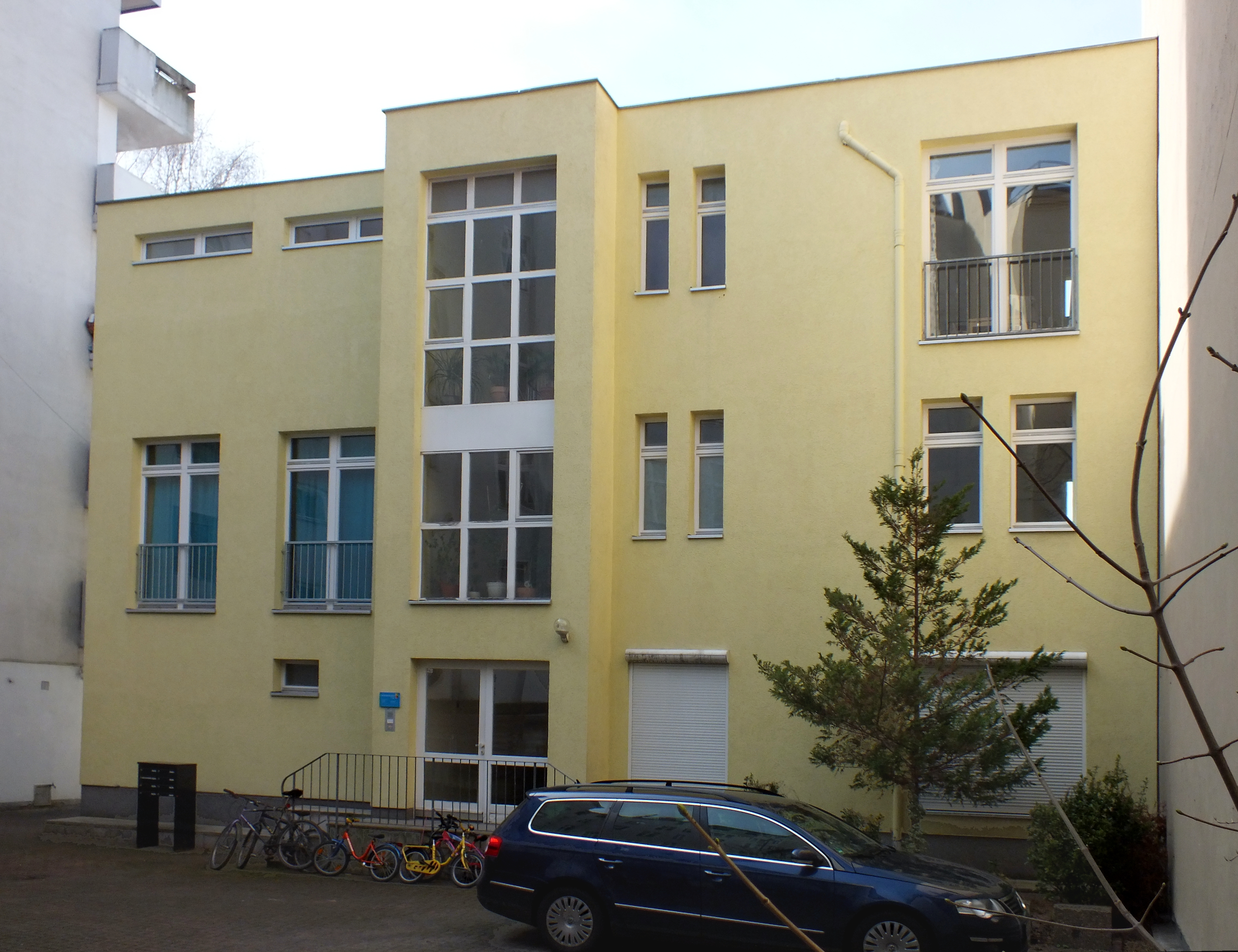 Fontanepromenade in Kreuzberg: Lückenbau Nummer 1a